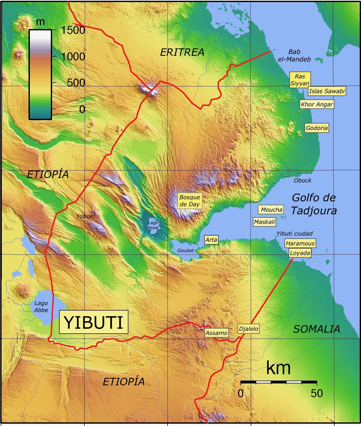 Áreas protegidas de Yibuti sobre mapa topográfico